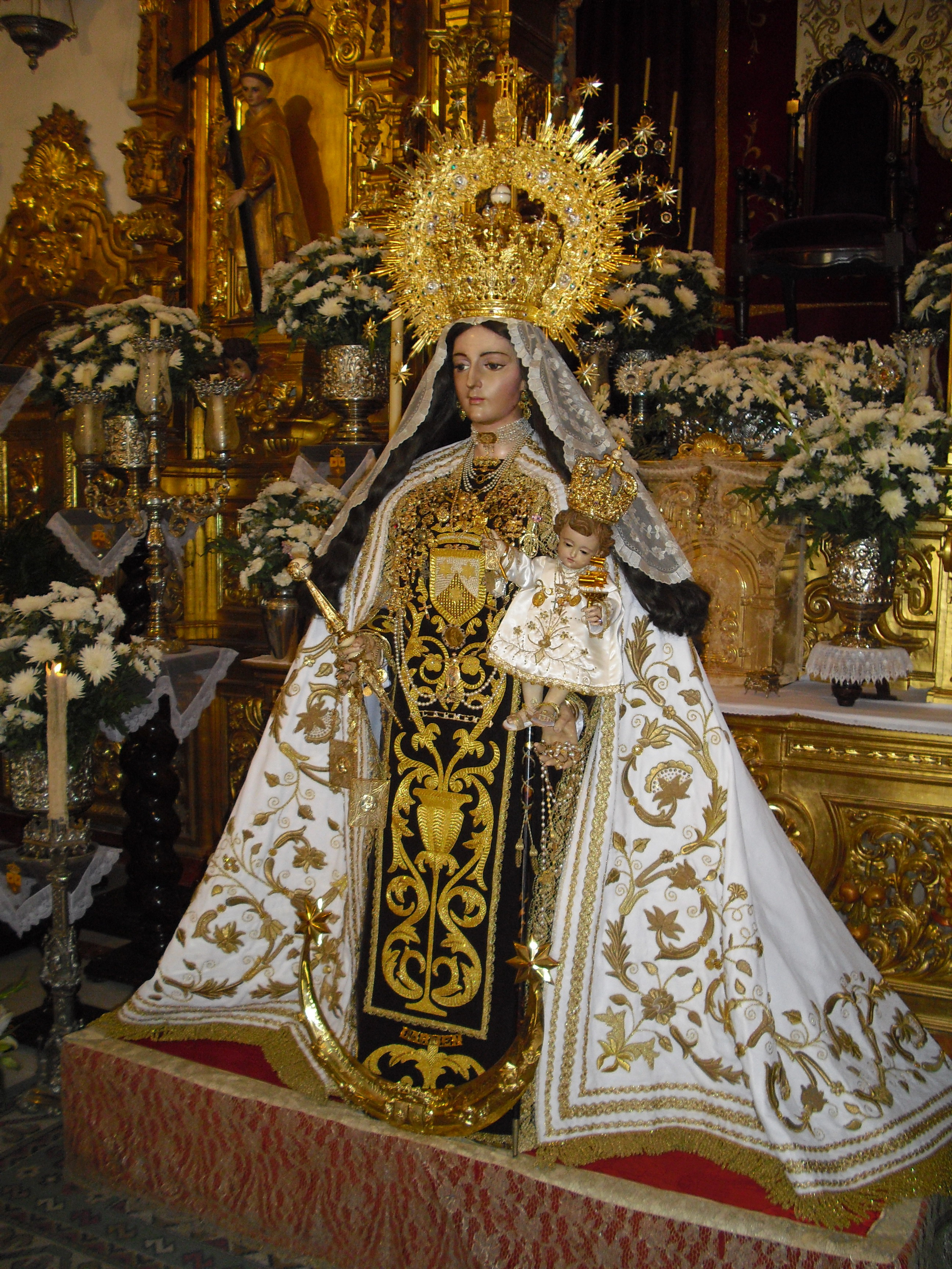 María Santísima del Carmen, Patrona de Rute (Córdoba, España), en su Santuario, preparada para recibir a las miles de personas que se acercan a visitarla en el día de su Besamanos y Onomástica. 16 de julio del 2009.